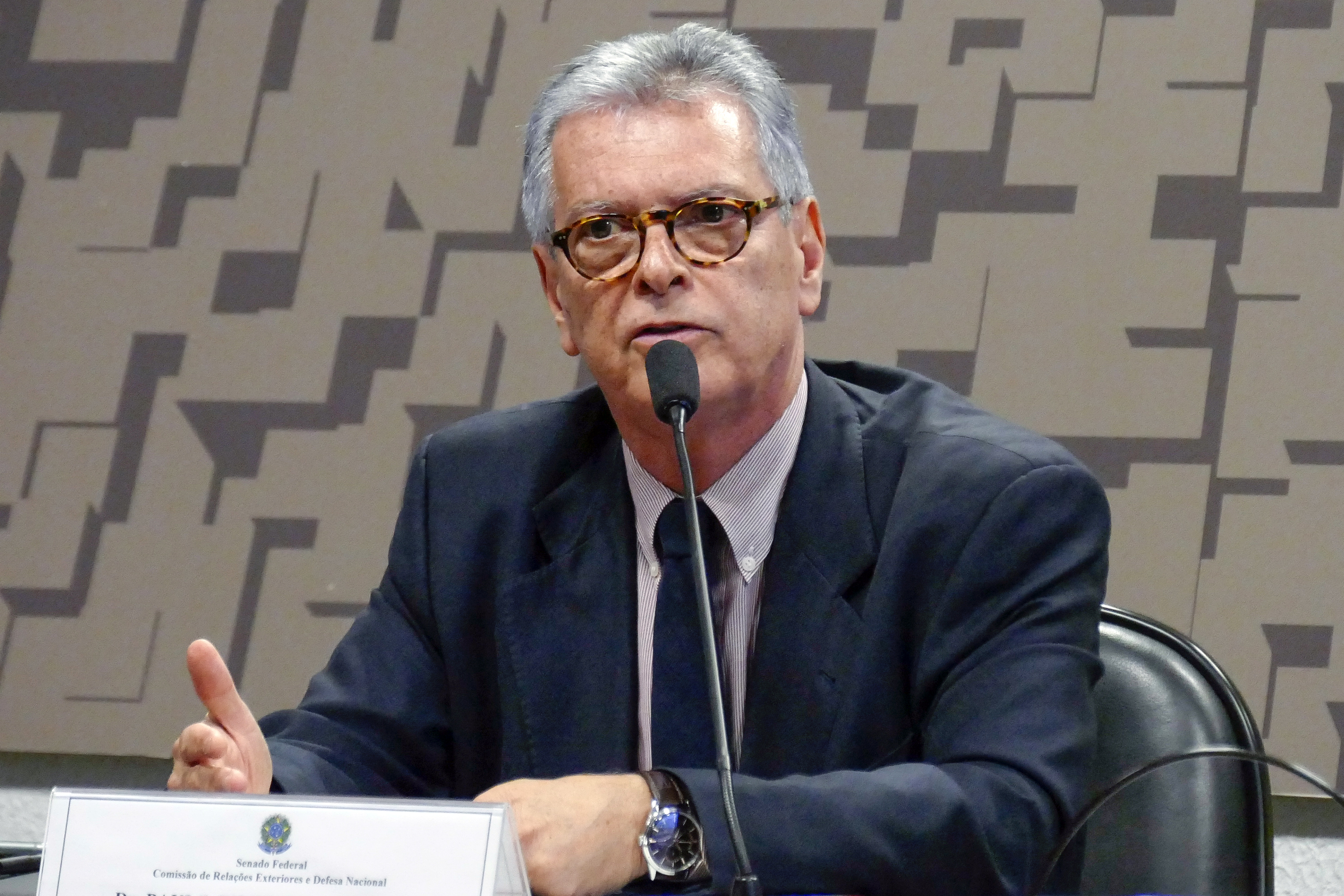 Comissão de Relações Exteriores e Defesa Nacional (CRE) realiza ciclo de debates "O Brasil e a Ordem Internacional: Estender Pontes ou Erguer Barreiras?" 6º Painel: "Oriente Médio: Conflitos Internos (Israel x Palestina) e terrorismo". À mesa em pronunciamento, pós-doutor em Relações Internacionais pela London School of Economics and Political Science; doutor em História Econômica pela Universidade de São Paulo e professor titular do Departamento de Economia e Relações Internacionais da Universidade Federal do Rio Grande do Sul (UFRGS), Paulo Gilberto Fagundes Visentini. Foto: Roque de Sá/Agência Senado